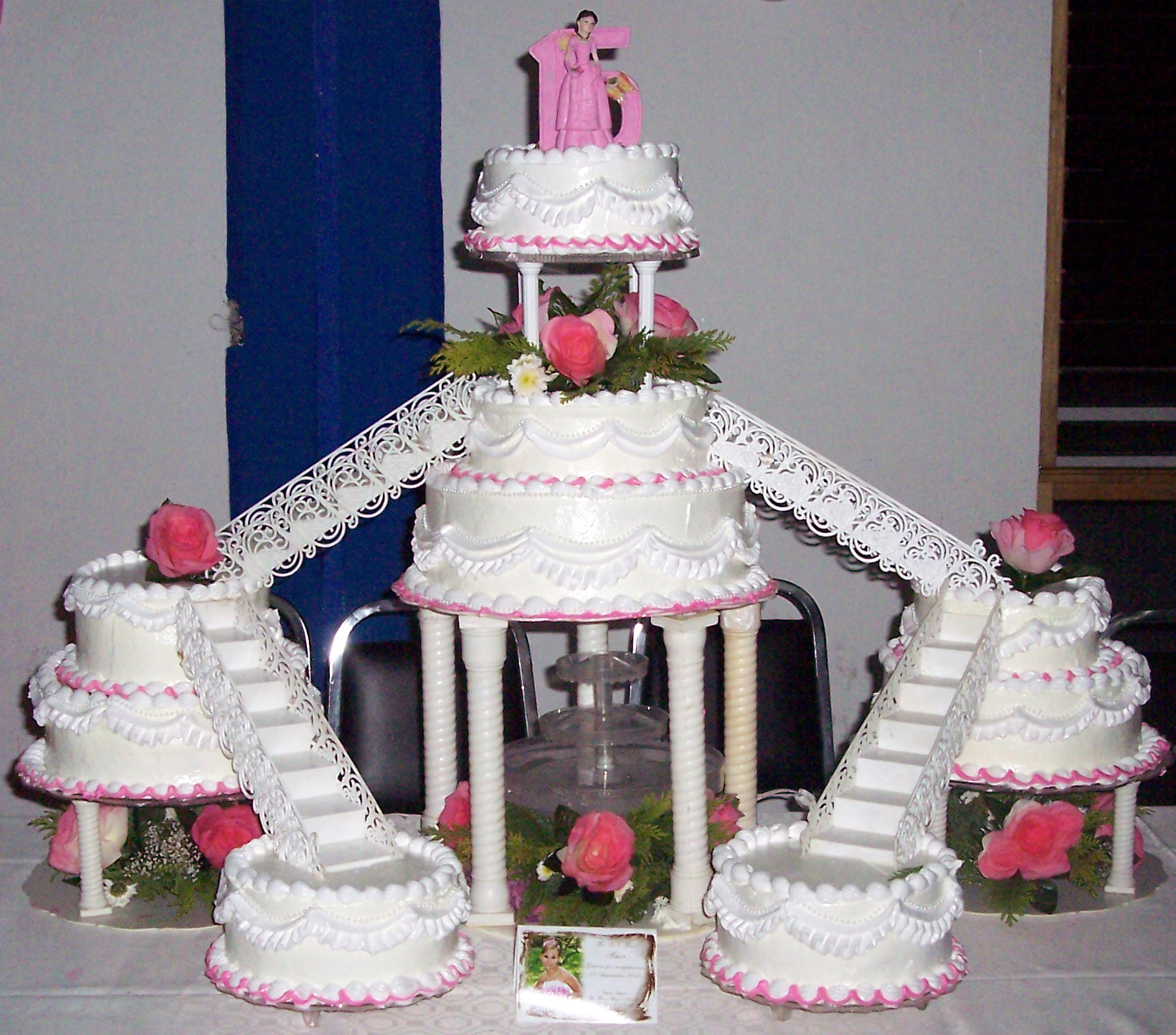 Pastel de quinceaños